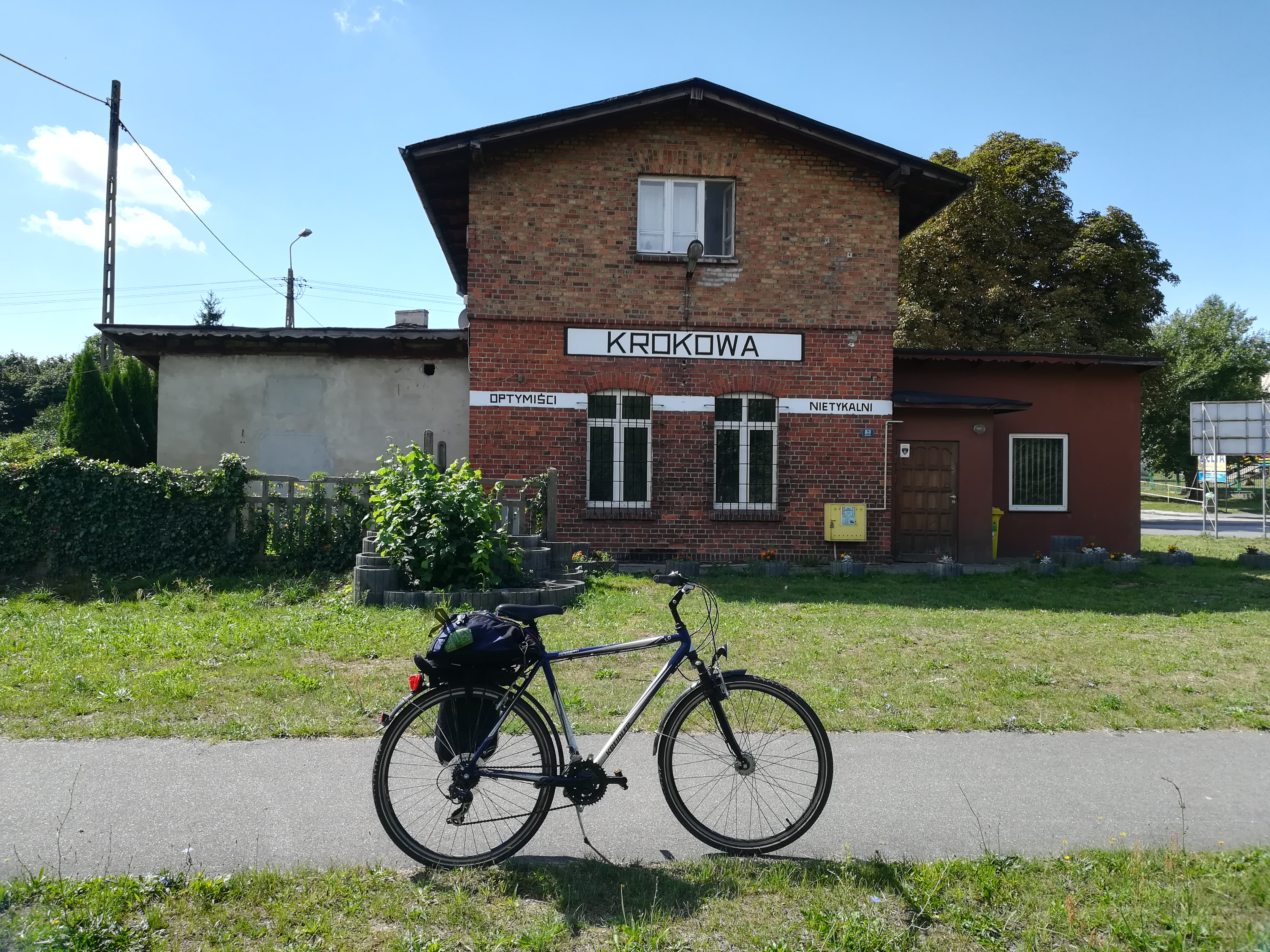 Ścieżka rowerowa po dawnej linii kolejowej Swarzewo - Krokowa.